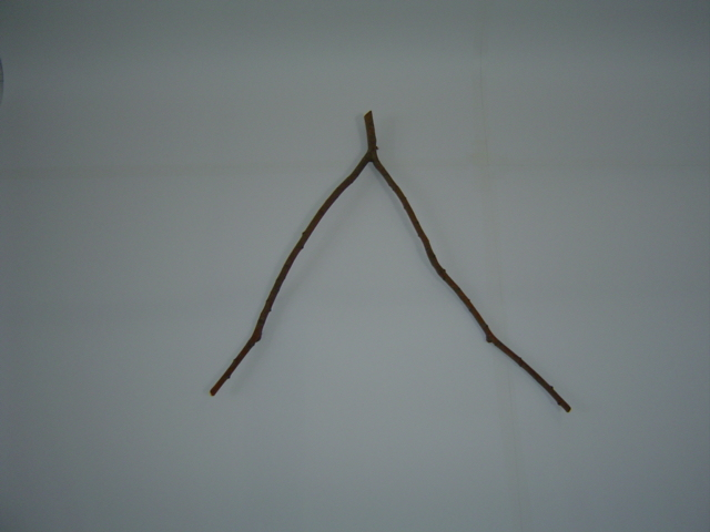 zelf gemaakte foto